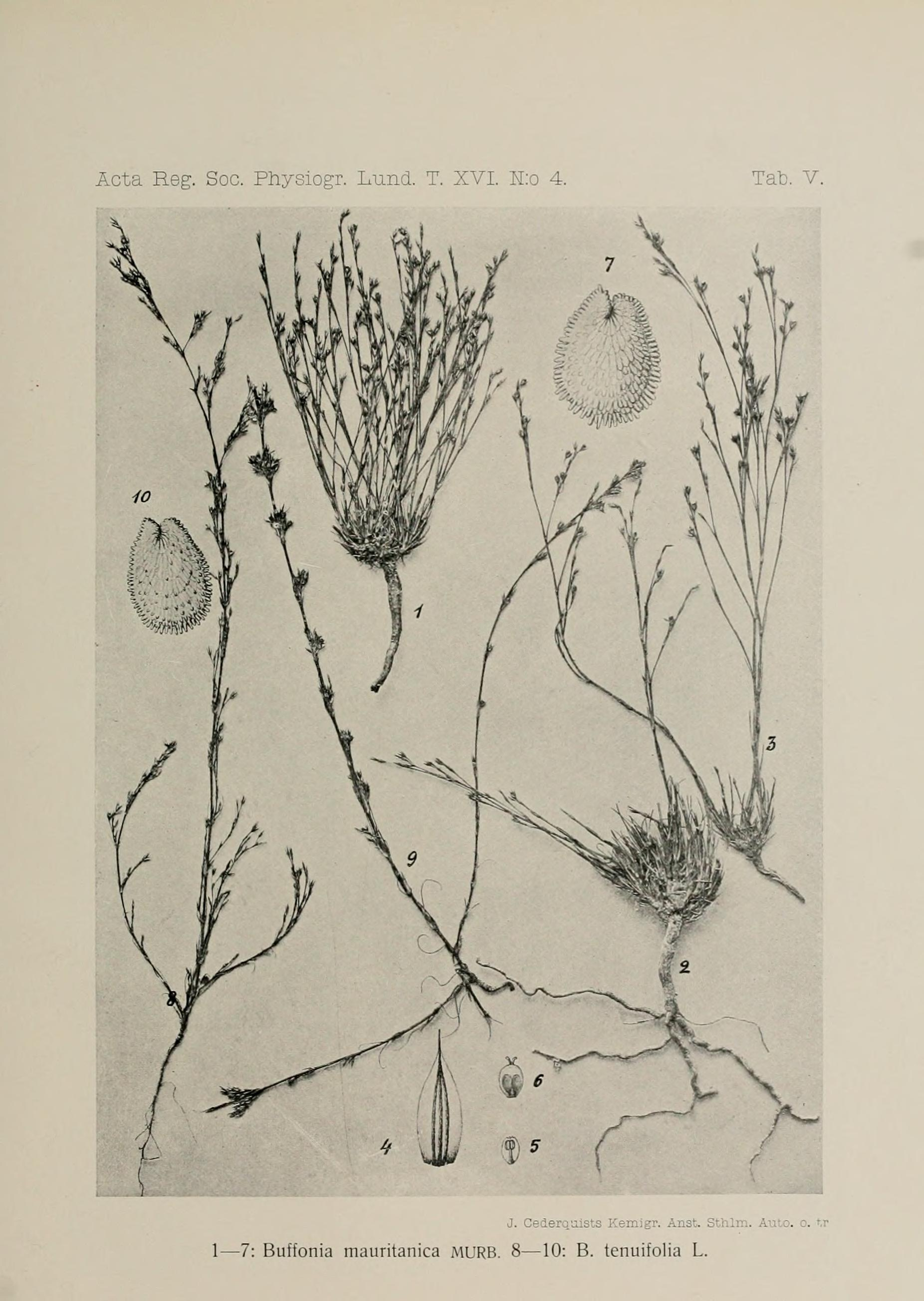 Contributions à la connaissance de la flore du nord-ouest de l'Afrique : et plus spécialement de la Tunisie. / par Sv. Murbeck.